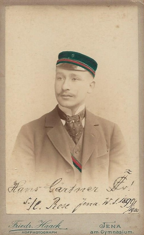 Porträtfotografie von Hans Gärtner